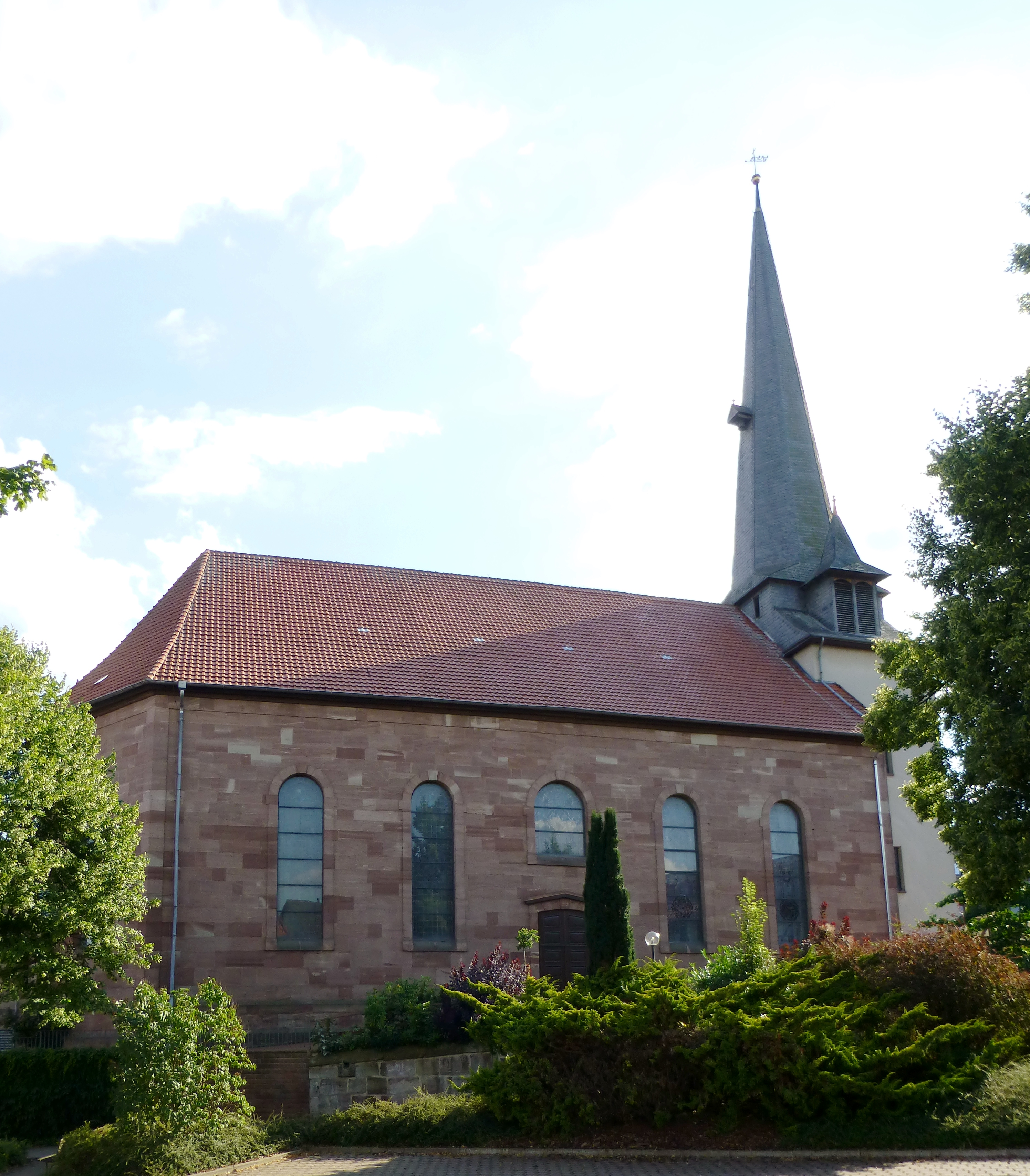 Katholische Pfarrkirche St. Georg in Nesselröden, Duderstadt, Eichsfeld. Erbaut 1853 durch L. Windhausen (Duderstadt), Turm barock (1710).